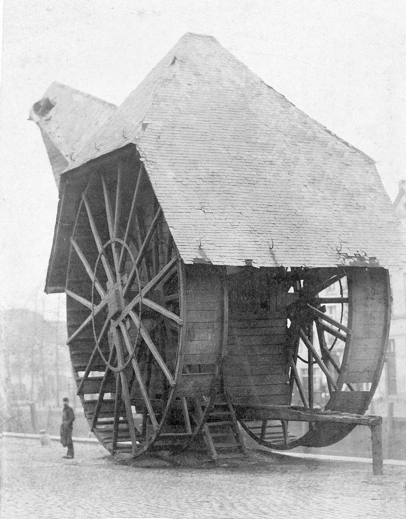 Oude foto met hijskraan in de Mechelse haven aan de Haverwerf. De oorspronkelijk 15e eeuwse hijskraan is ontworpen door Jan Keldermans. In de tredraderen liepen de "kraankinderen" om vrachten te kunnen hijsen. De kraan werd in 1887 afgebroken.